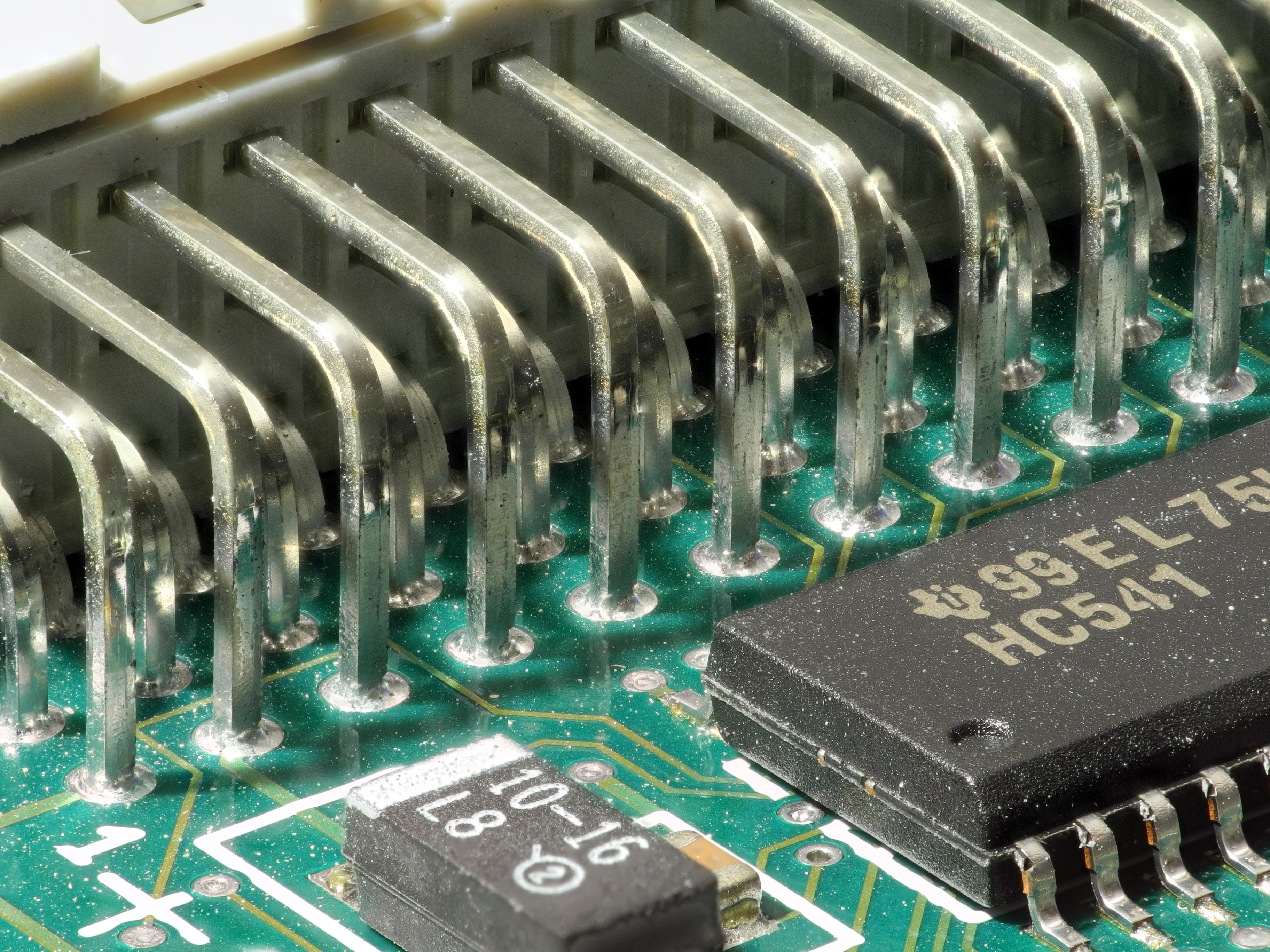 Focus stacking of 40 pictures (using Zerene Stacker).Composants électroniques (focus stacking). Image composée de 40 photos prises avec la bonnette Raynox DCR-250 et assemblées avec Zerene Stacker.